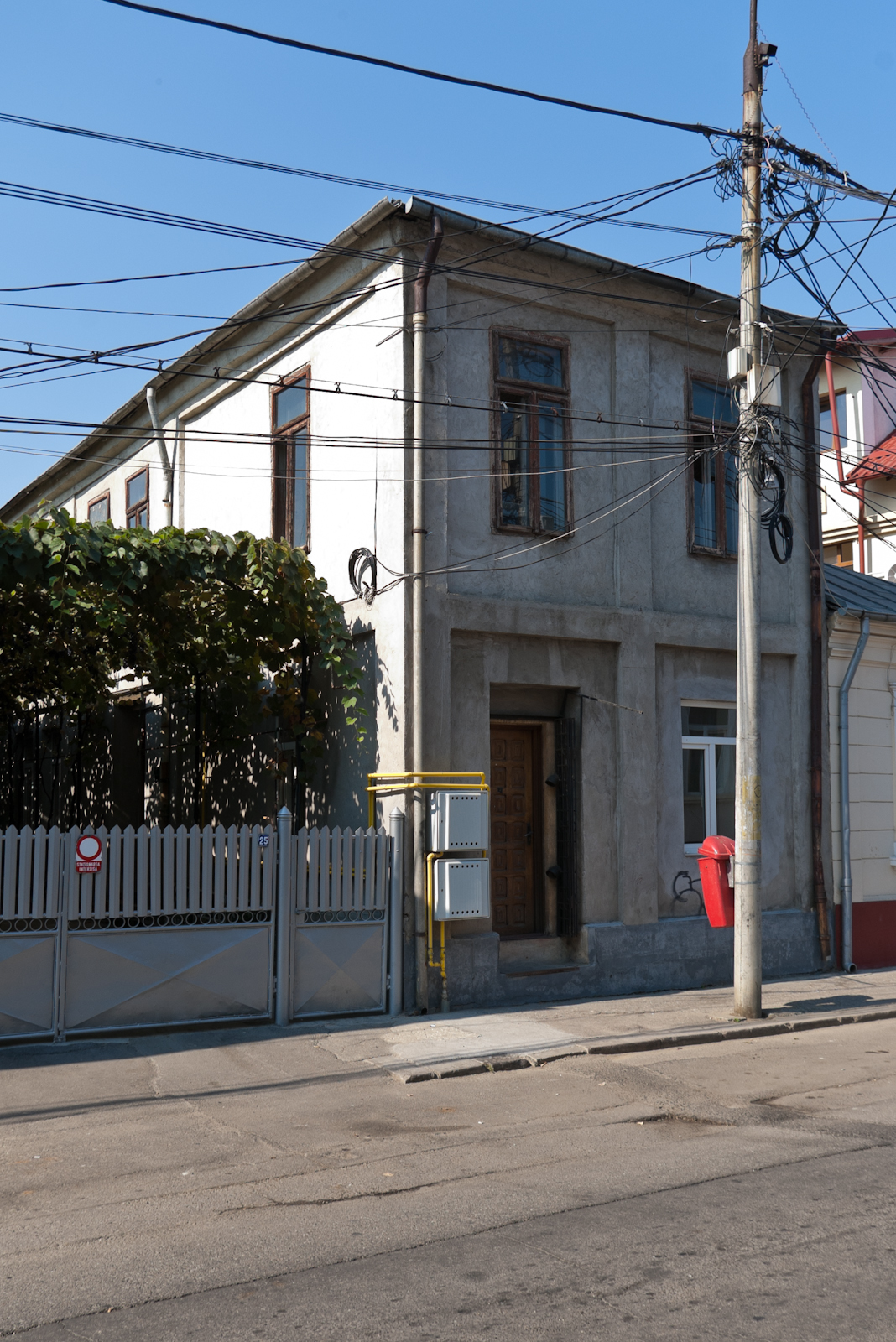 Fotografia prezinta casa de pe str. Victoriei 25 din Pitesti, vazuta dinspre NE.